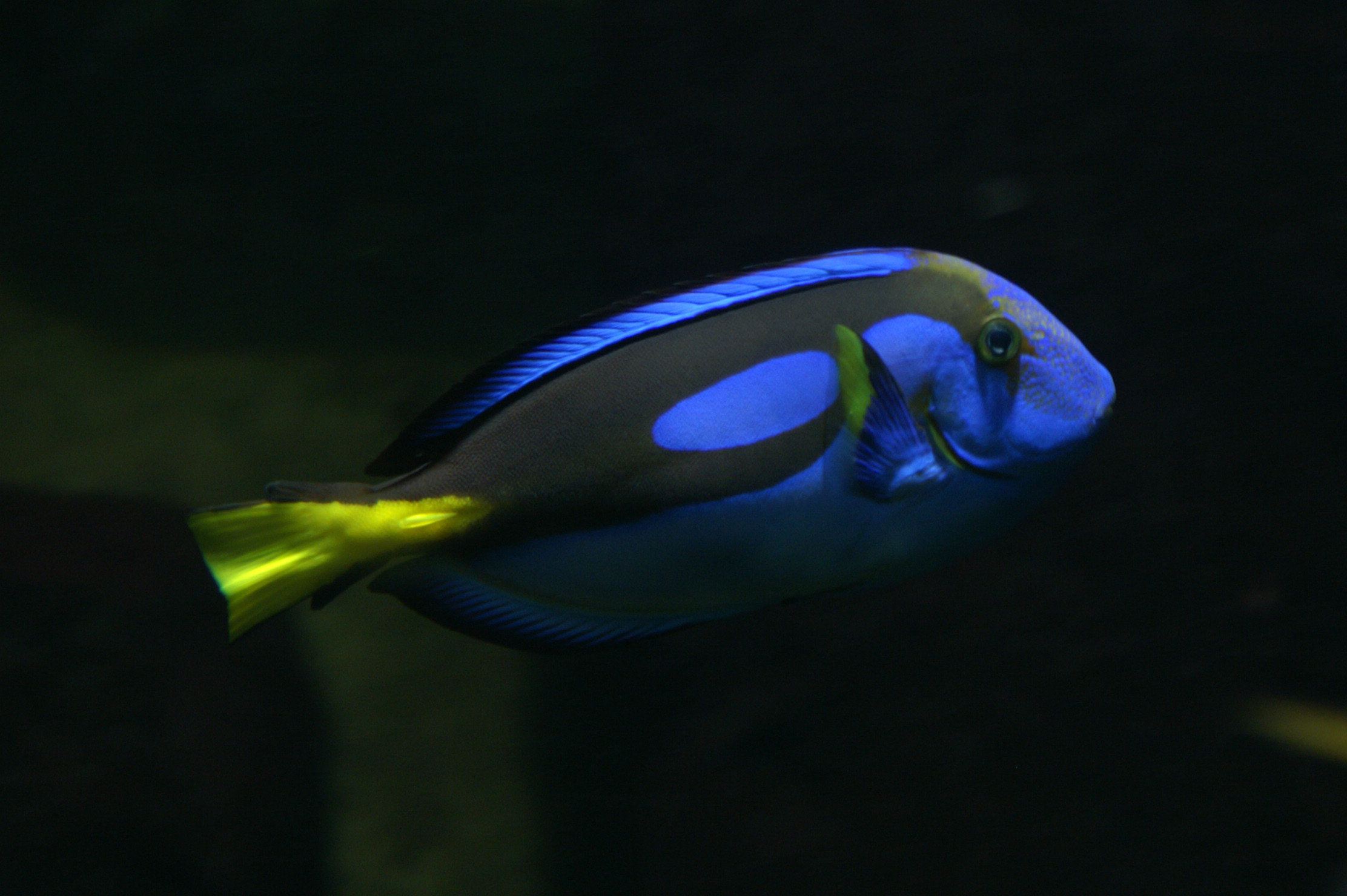 Paletten-Doktorfisch fotografiert im Zoo Zürich (CH)